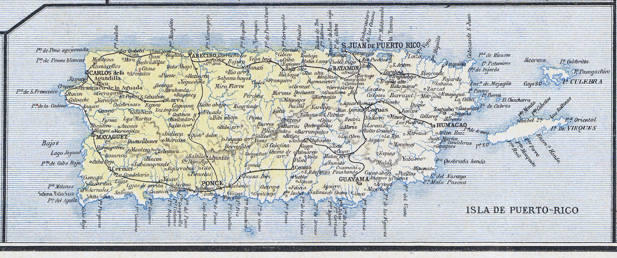 Isla de Puerto Rico. Detail from a map Nuevo mapa de España y Portugal y de sus colonias, ilustrado con los 49 escudos de sus Provincias y con las 14 Decoraciones Militares, indicando todos los caminos de hierro, carreteras, ríos y canales, Escala 1/165000